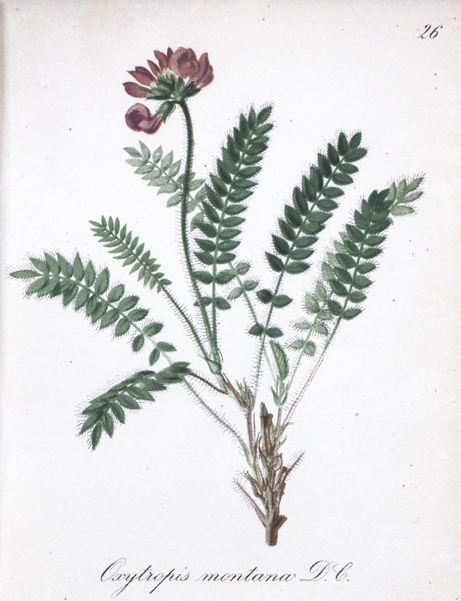 Die Alpenpflanzen nach der natur gemalt v. 1, 1879